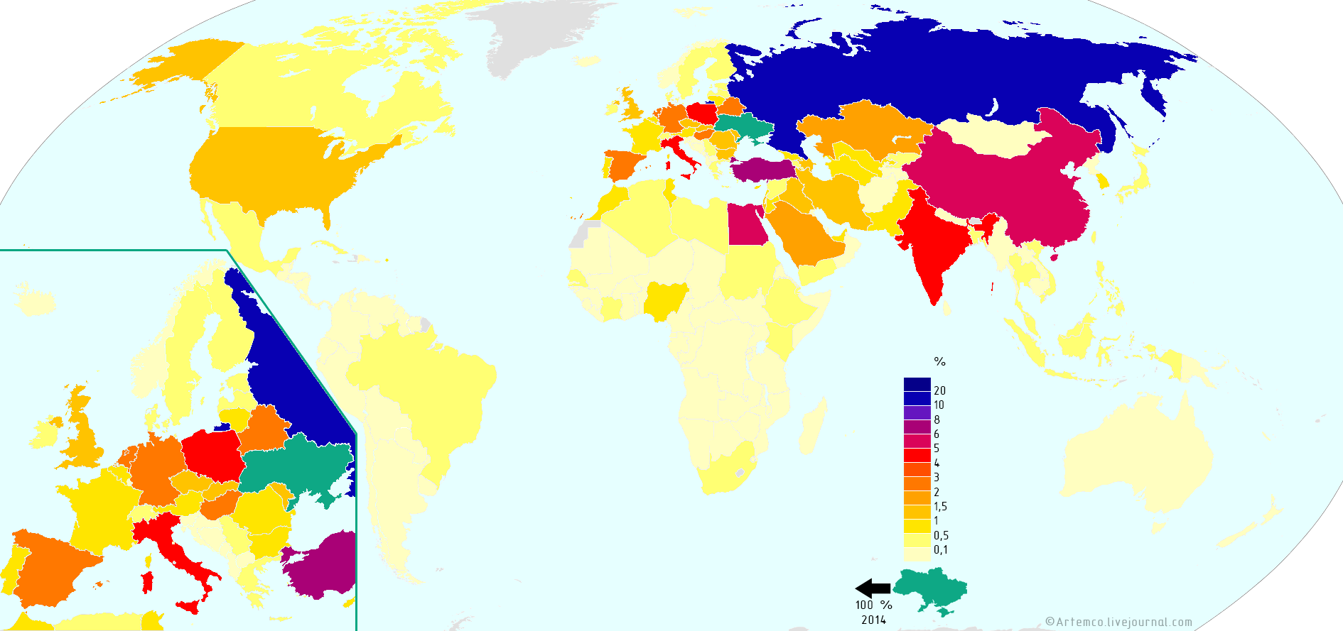 доля стран в общем экспорте из Украины